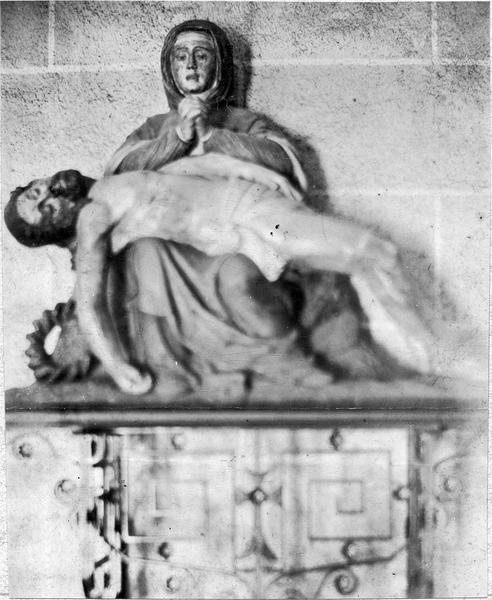 Pietà in der Kirche Saint-Pierre in Le Brethon